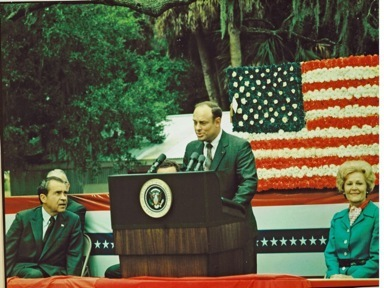 197- JC LEWIS MAYOR OF SAVH WITH RICHARD NIXON